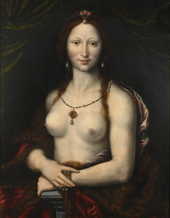 Joos Van Cleve, According to Leonardo da Vinci, Mona Vanna Nuda, National Gallery in Prague